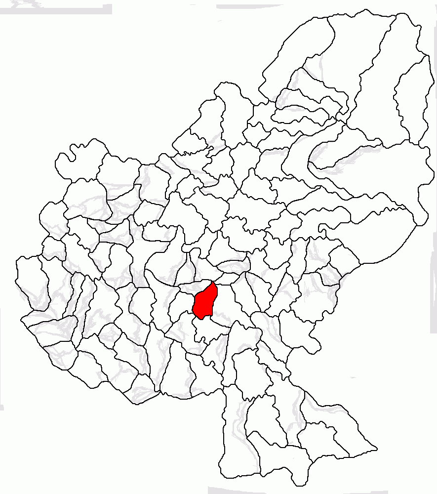 Categorie:Hărţi ale judeţului Mureş